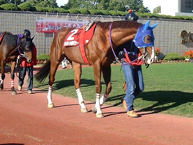 カネトシガバナー 02-11-09京都ハイジャンプ